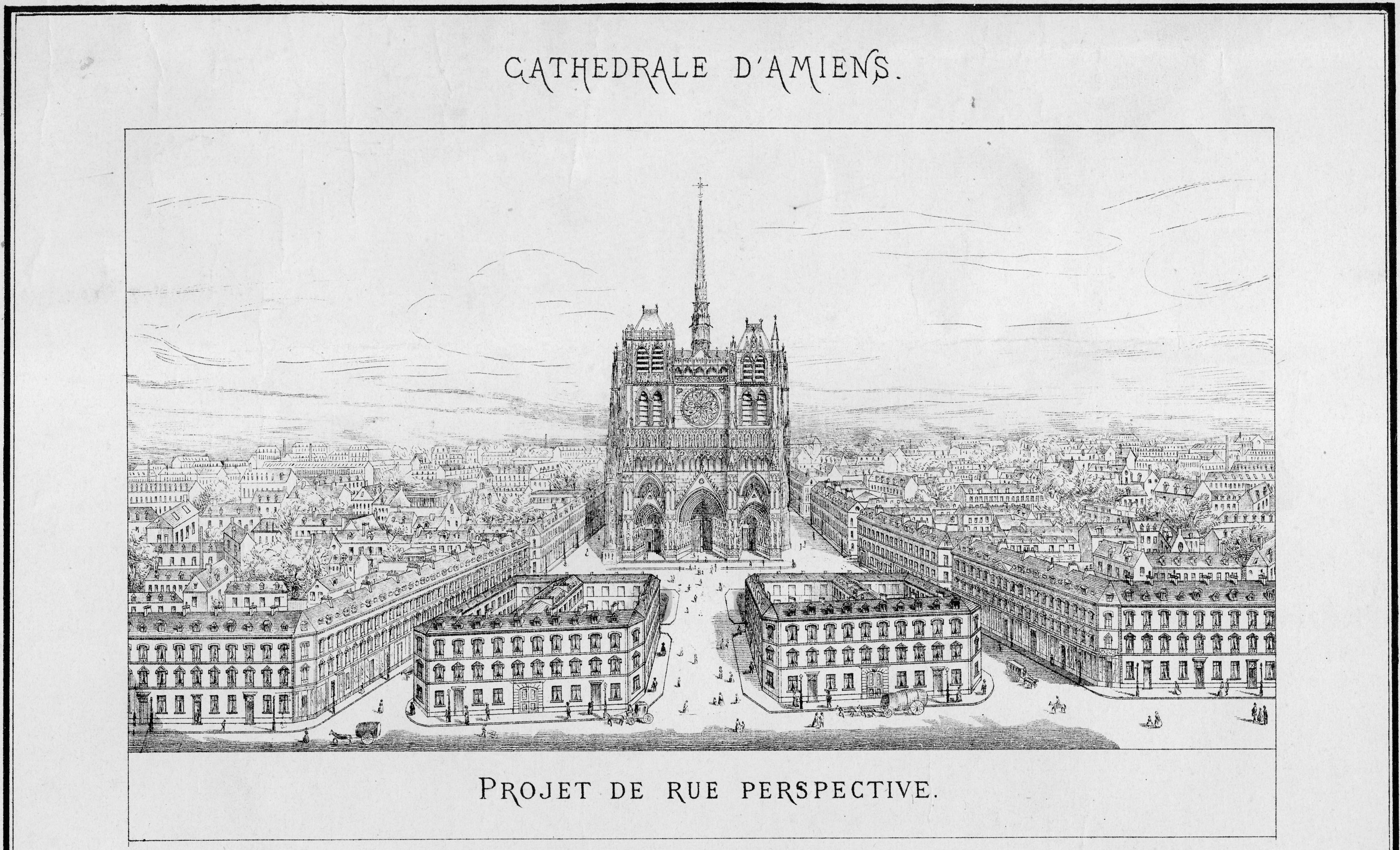 Amiens, abords de la cathédrale : projet de dégagement, avec percement d'une vaste perspective donnant sur le massif ouest (Jean Herbault, 1855). Document conservé aux Archives départementales de la Somme.